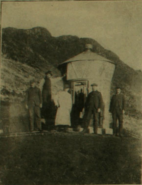 Faro Morrion, foto publicada en 1916